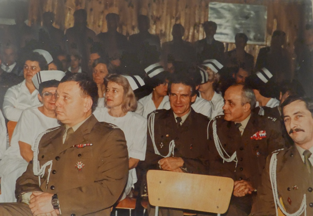 Dowódca, kadra, pracownicy cywilni 45 Batalionu Medycznego podczas uroczystości